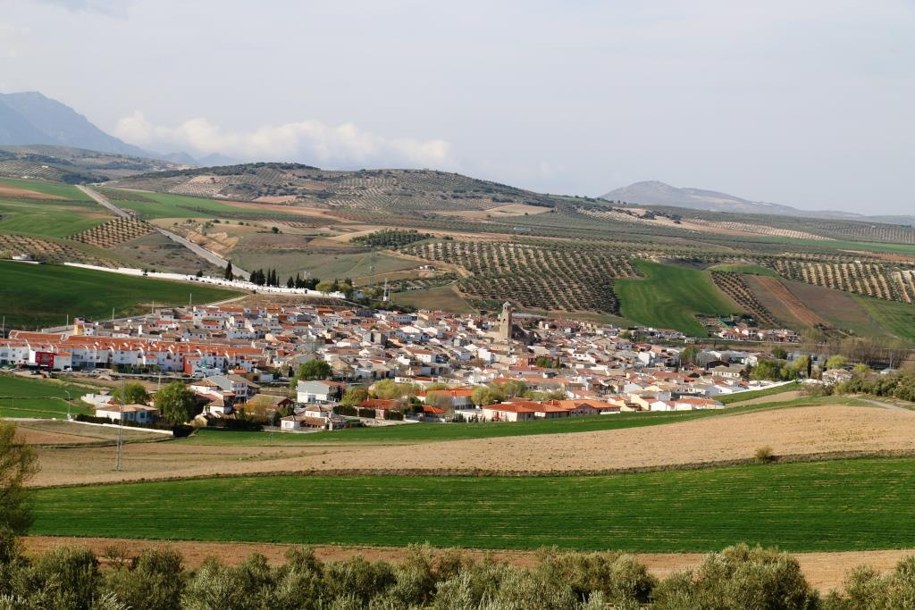 Panoramica de guadahortuna 2